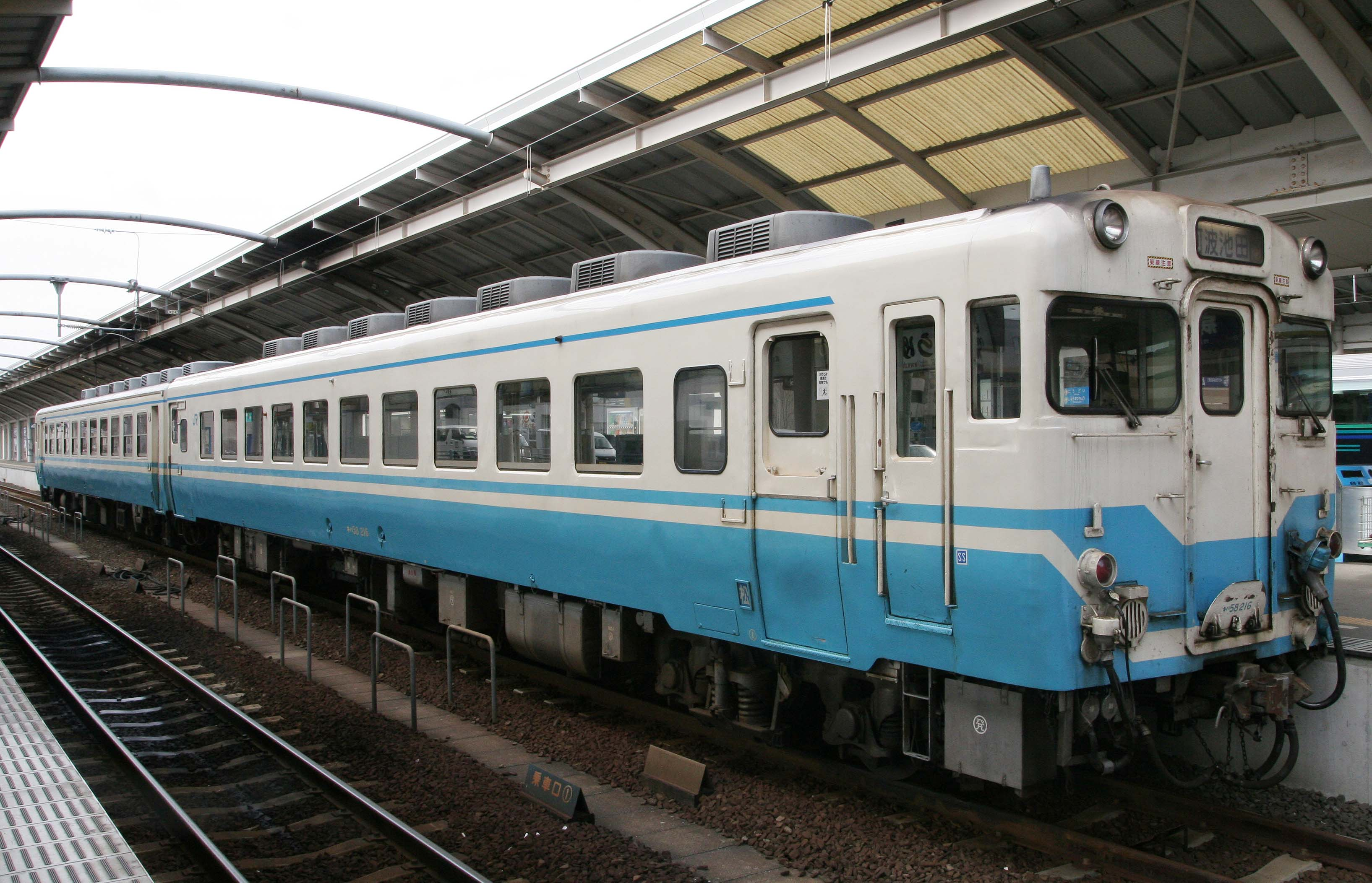 JR四国キハ58形気動車216 JR四国色 高松駅